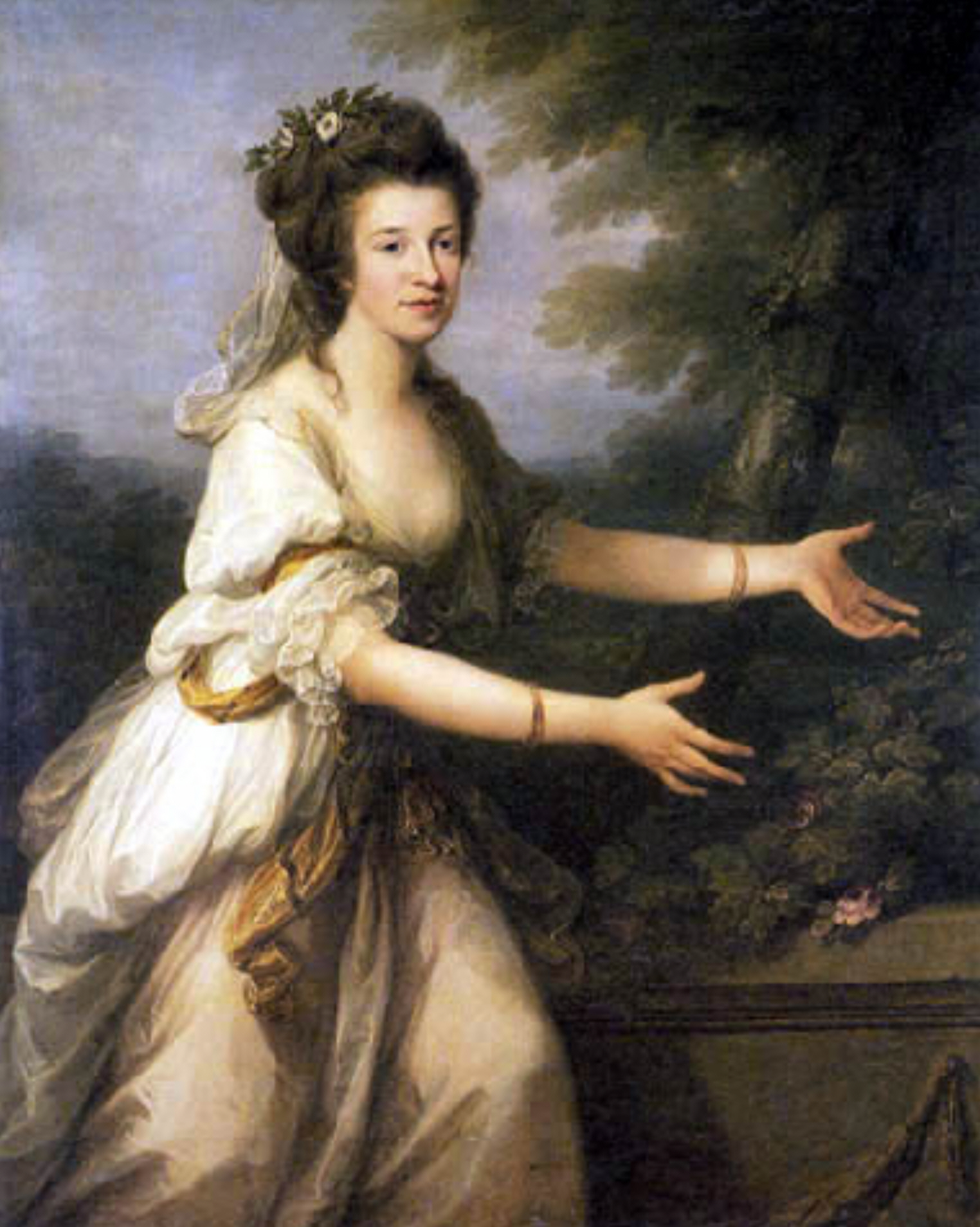 Das Original des im Ahrensburger Schloss ausgestellten, 1783/84 in Rom entstandenen Auftragswerks, befindet sich heute, zusammen mit Mobiliar der Ausstattung des Herrenhauses Emkendorf aus dem Besitz von Friedrich und Julia Reventlow, in der Klassizismus-Abteilung des Schleswig-Holsteinischen Landesmuseeums Schloß Gottorf in Schleswig (s.a. Stiftung Schleswig-Holsteinische Landesmuseen Schloß Gottorf / hrsg. von Herwig Guratzsch, Prestel-Museumsführer, 2001 - ISBN 3-7913-2555-8).